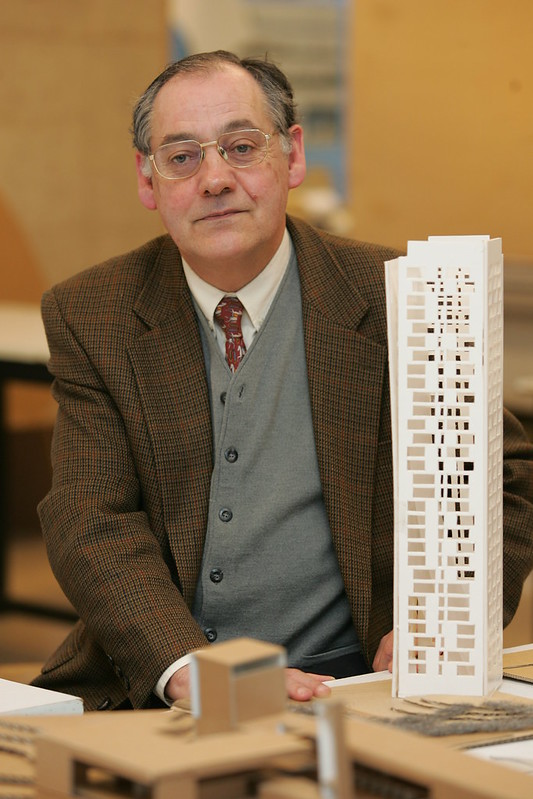 Domingo Pellicer, arquitecto español, catedrático de construcciones de la UPM y de la Universidad de Navarra,​ e investigador del hormigón.